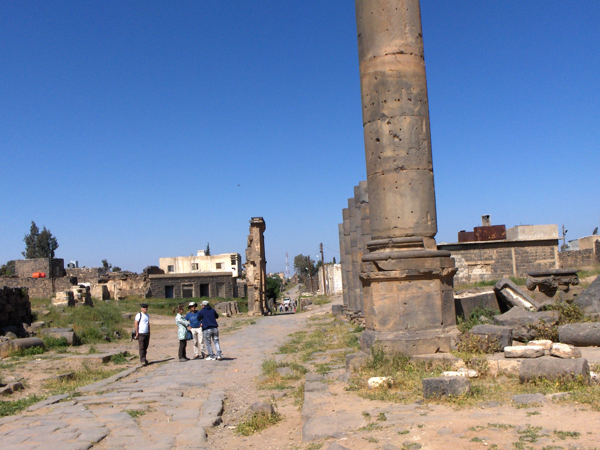 Una via di Bosra, Siria